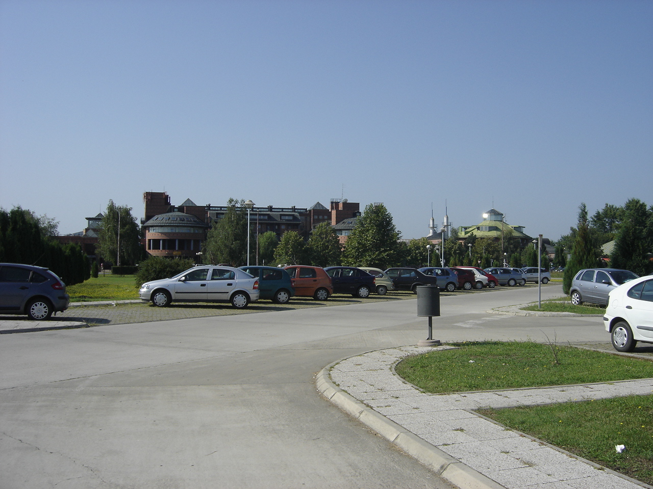 Bizovačke toplice